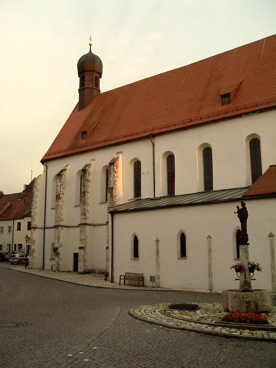 Abensberg - Klosterkirche "Unsere liebe Frau vom Berge Karmel", Juli 2004